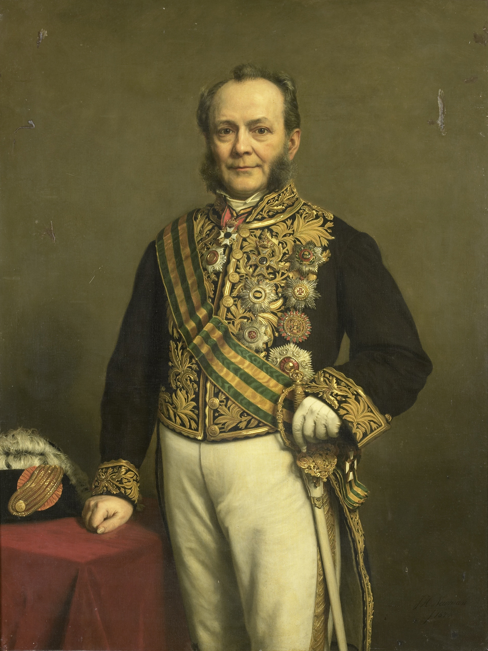 Portret van Pieter Mijer (1812-81). Gouverneur-generaal (1866-71). Kniestuk, staande, en face. De rechterhand rustend op een tafel waarop de steek ligt, de linkerhand op het gevest van zijn degen. Onderdeel van een reeks van portretten van de gouverneurs-generaal van het voormalige Nederlands Oost-Indië. Collection: schilderijen; Gouverneurs-generaal serie